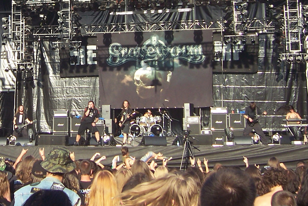 Graveworm en Metal Camp (Eslovenia)